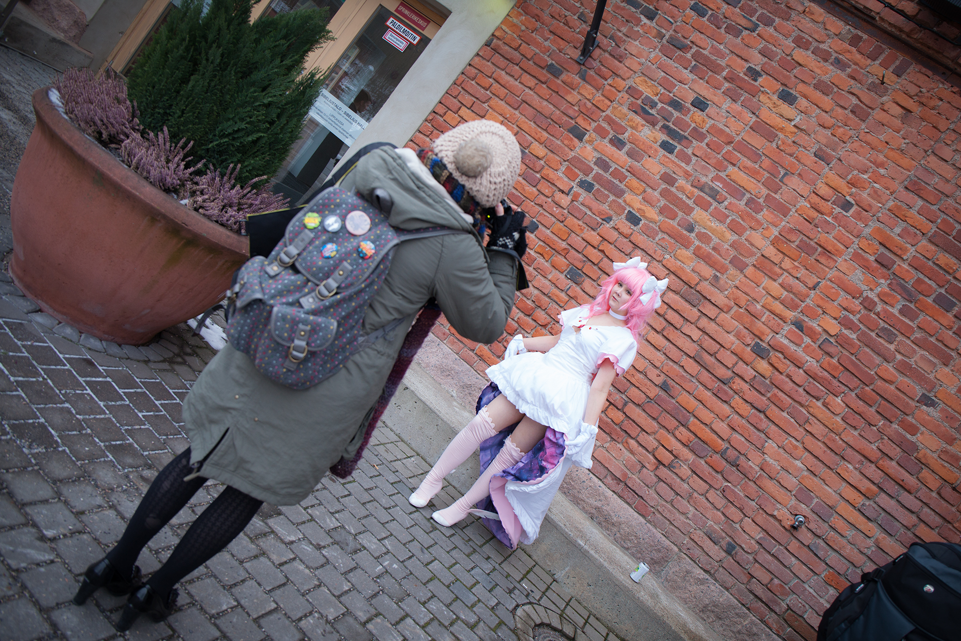 Desucon Frostbite 2014，一名扮演鹿目圆的Cosplayer。